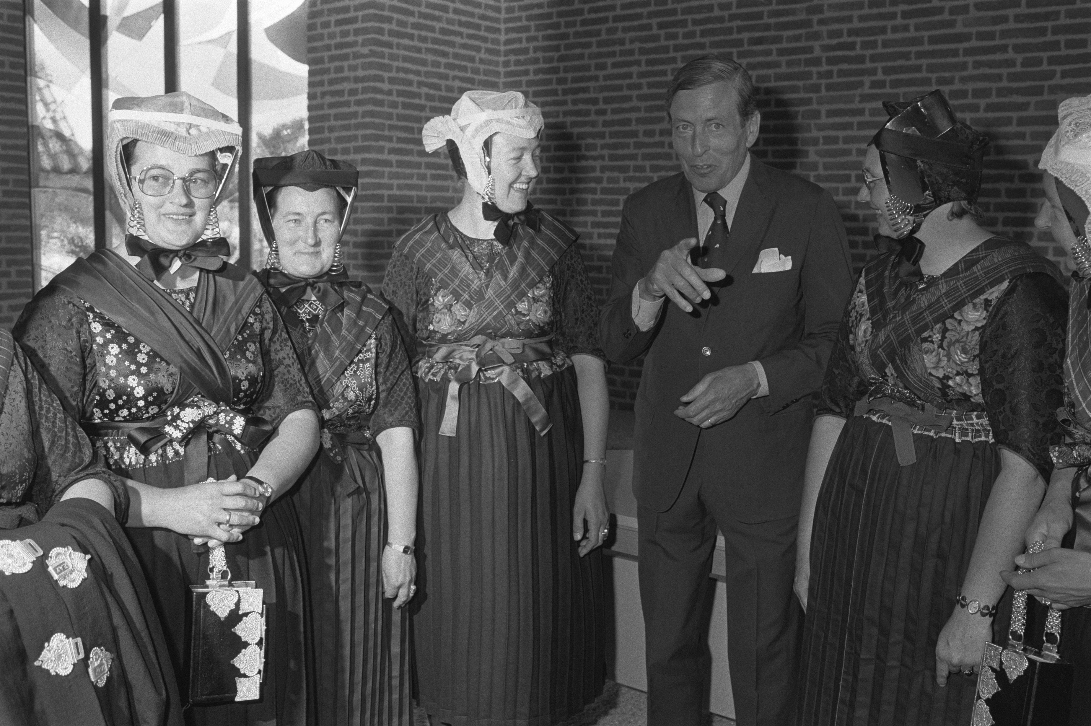 Collectie / Archief : Fotocollectie Anefo Reportage / Serie : [ onbekend ] Beschrijving : Prins Claus opent nieuwe gemeentehuis van Staphorst Datum : 9 juni 1982 Locatie : Overijssel, Staphorst Trefwoorden : gemeentehuizen, openingen Persoonsnaam : Claus, prins Fotograaf : Antonisse, Marcel / Anefo Auteursrechthebbende : Nationaal Archief Materiaalsoort : Negatief (zwart/wit) Nummer archiefinventaris : bekijk toegang 2.24.01.05 Bestanddeelnummer : 932-2041